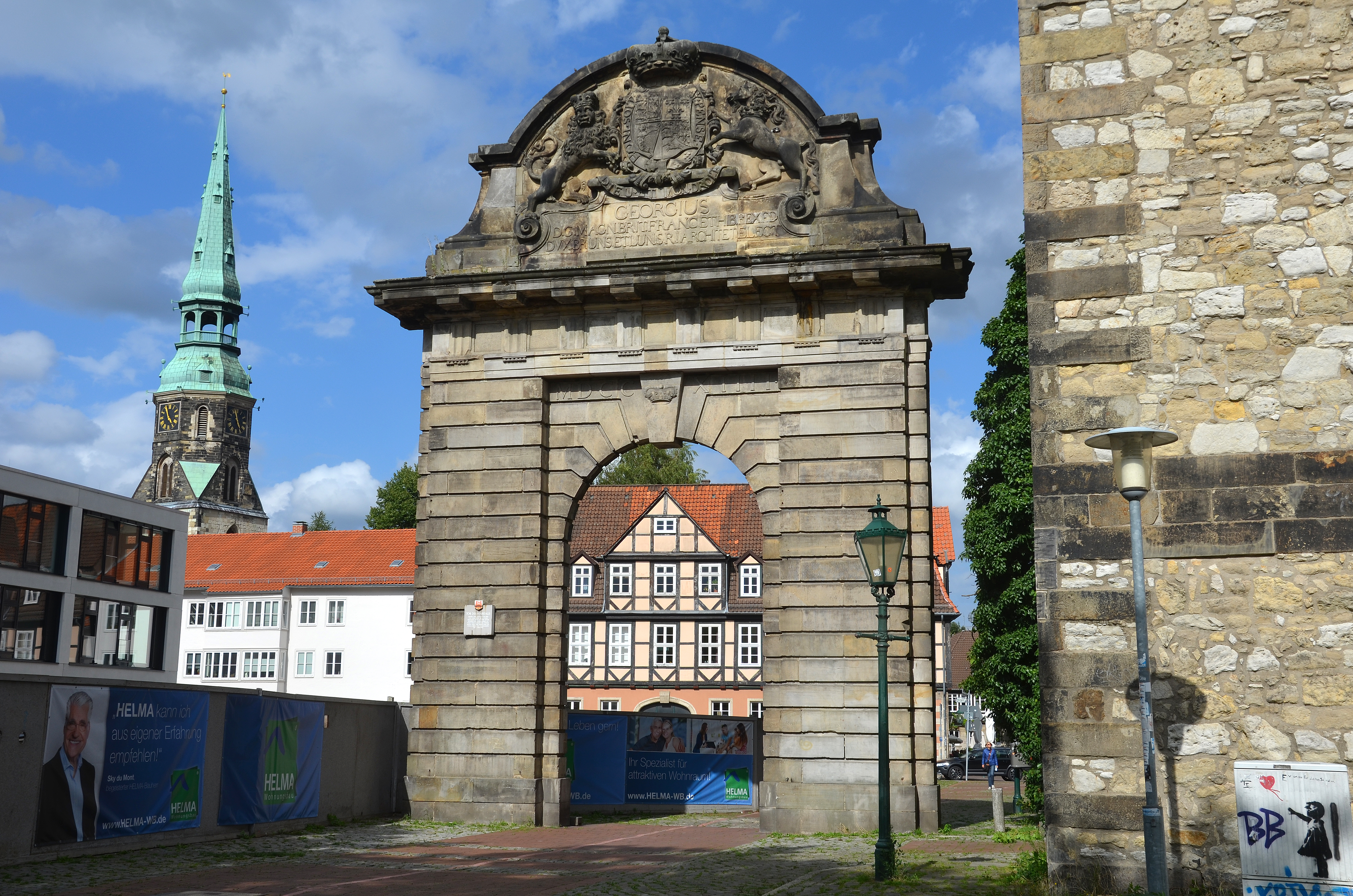 Das Marstalltor am Hohen Ufer als Durchgang zur Straße Roßmühle, im Hintergrund links der Turm der Kreuzkirche ...